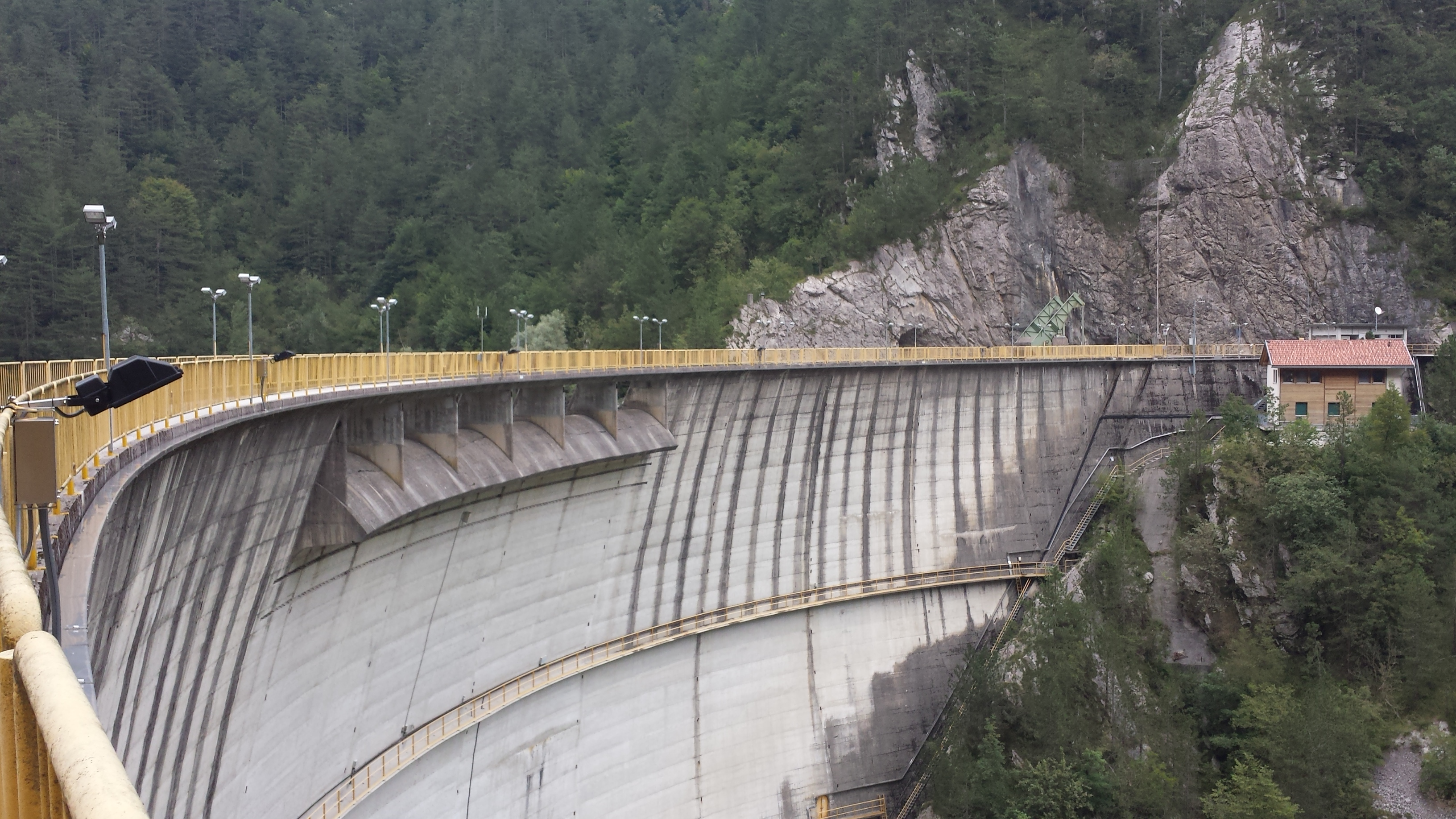 Uno scorcio della diga di Ca' Zul